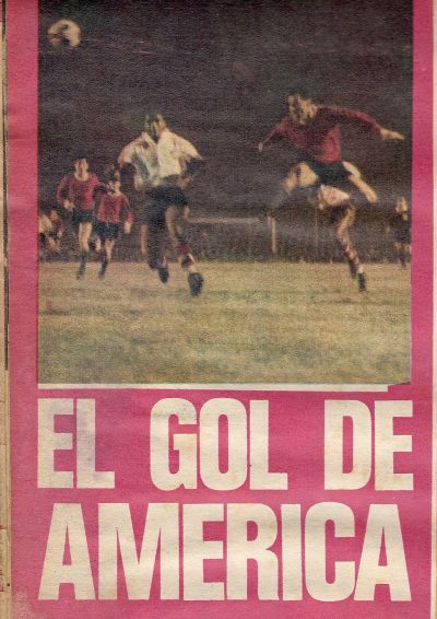 Gol de Mario Rodriguez que le dio la Copa Libertadores 1964 a Independiente, en el 1 a 0 frente a Nacional